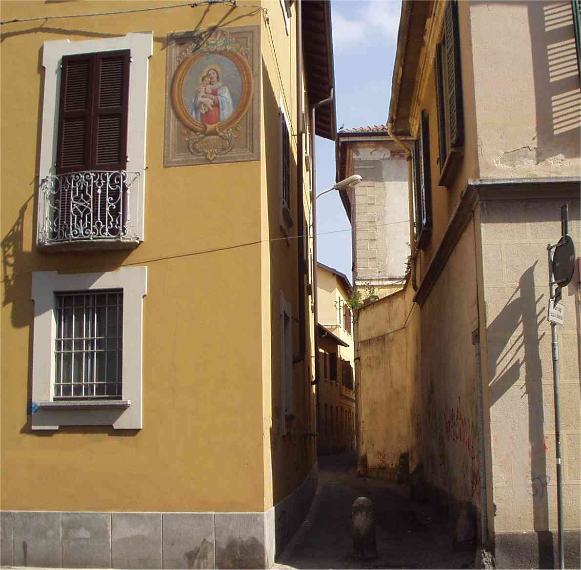 Monza via della Signora dedicata a suor Maria Virginia de Leyva dalla parte di via Moriggia - Porta Lodi